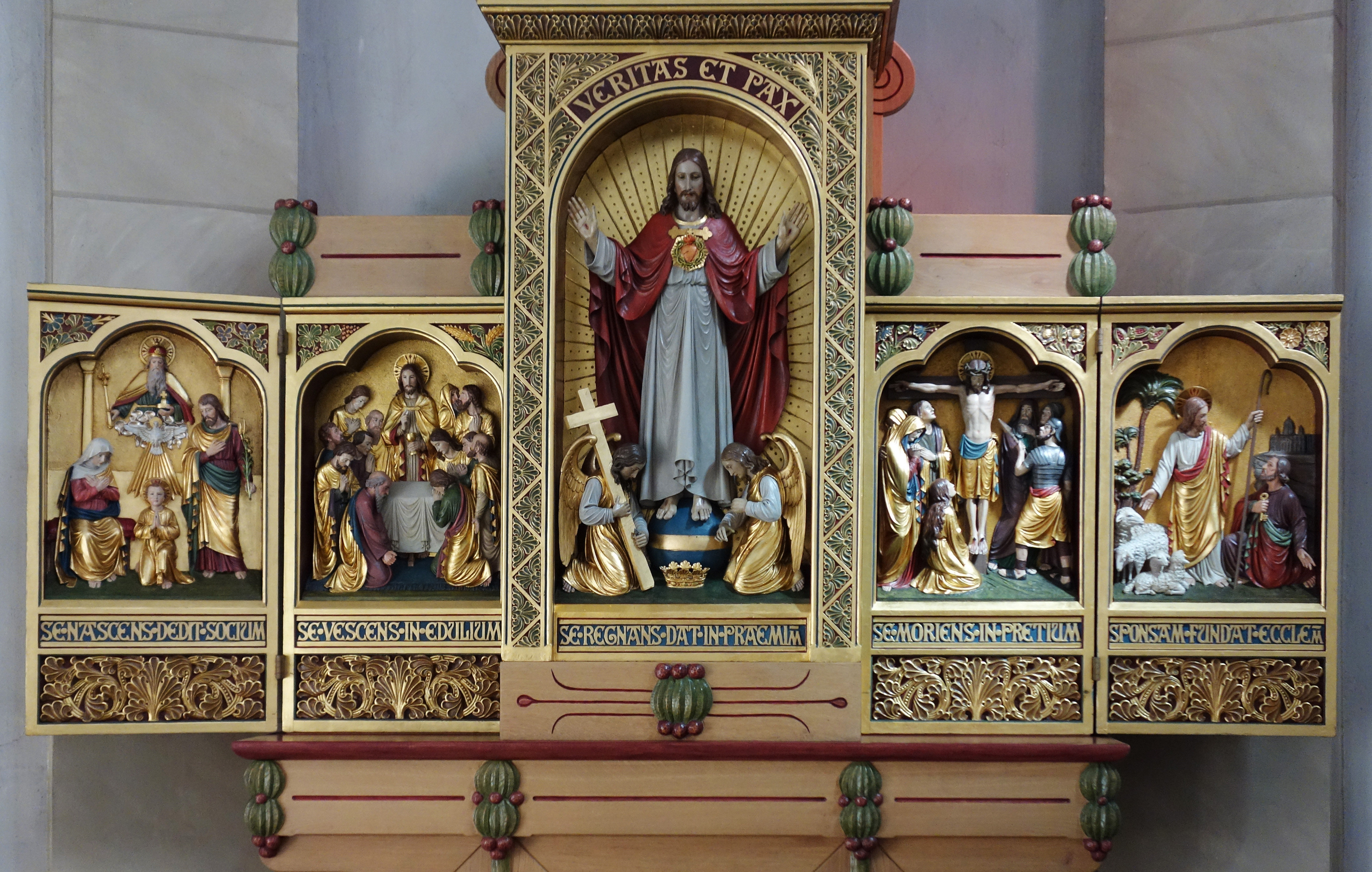 Pfarrkirche St. Maria-St. Vicelin, Neumünster, Herz-Jesu-Altar